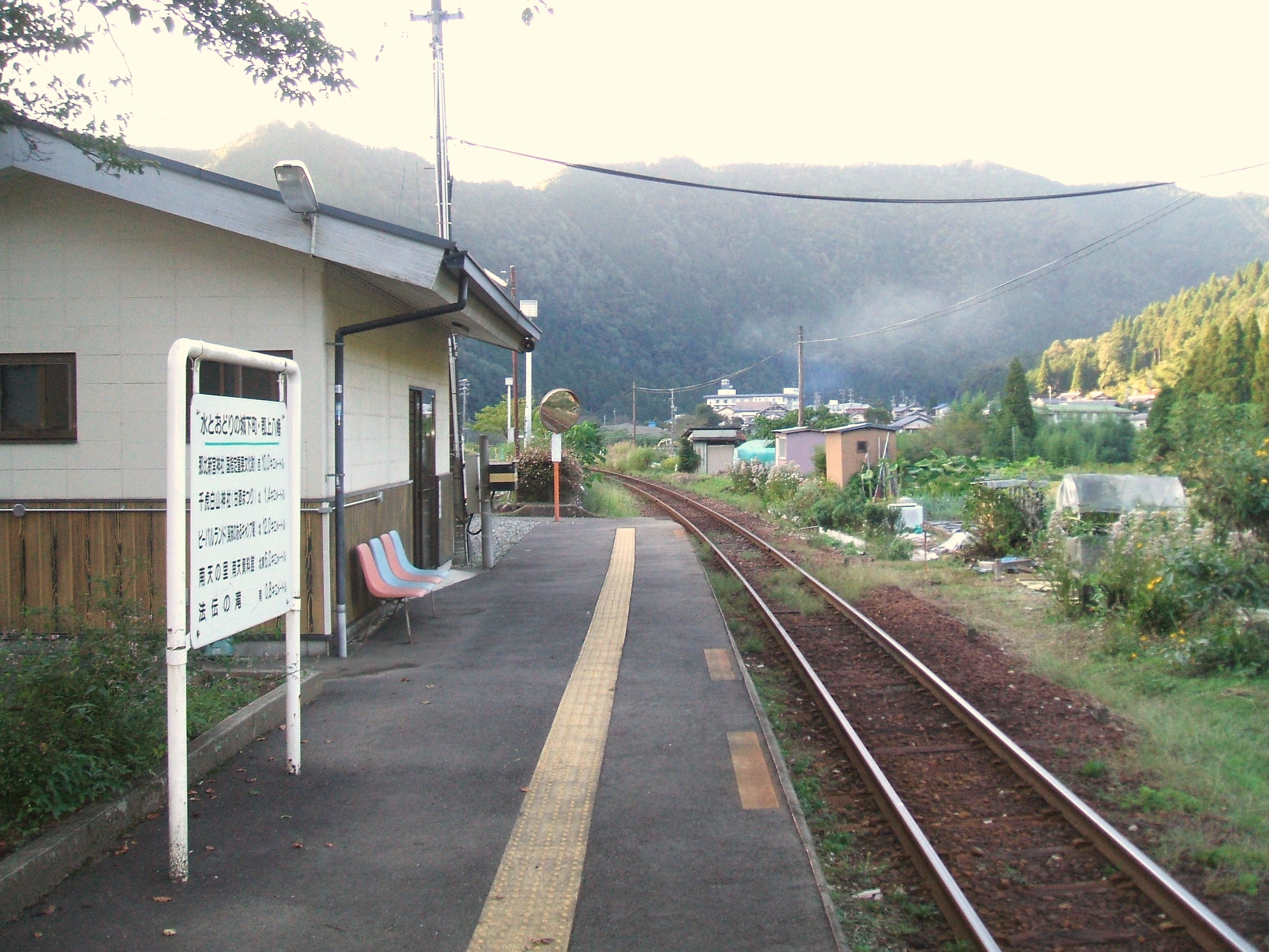 相生駅ホームの様子。